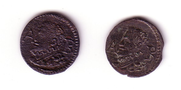 Un ardit era un moneda catalana de billó encunyada a diferents localitats catalanes durant els segles XVI i XVII. A l'anvers dels ardits hi figuren les lletres A-R.